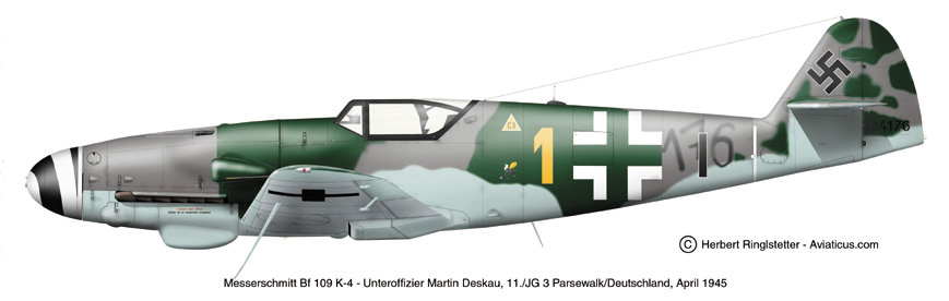 Messerschmitt Bf 109 K-4, 11./JG 3, April 1945